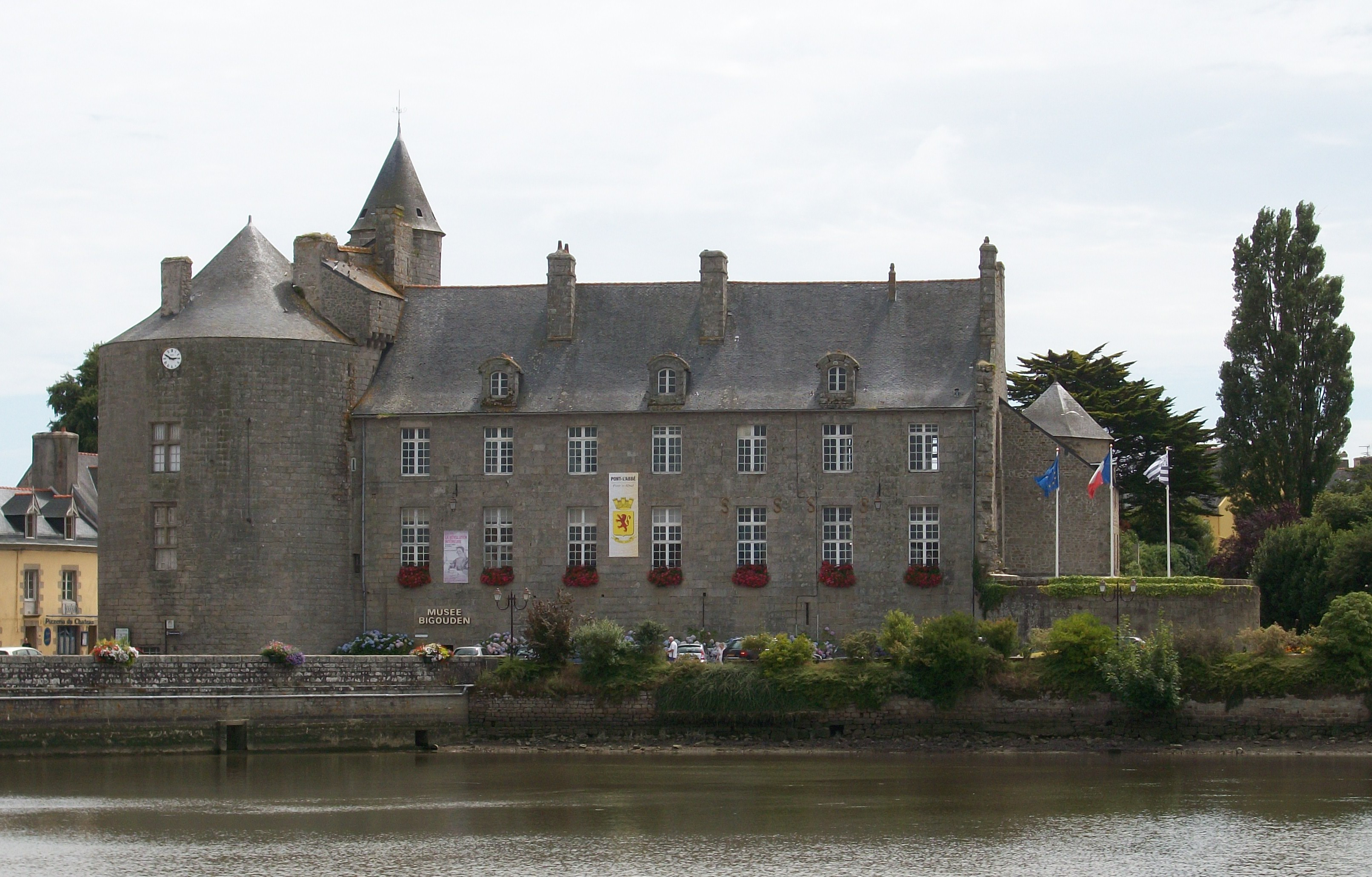 Château de Pont l'Abbé (désormais "Musée bigouden")